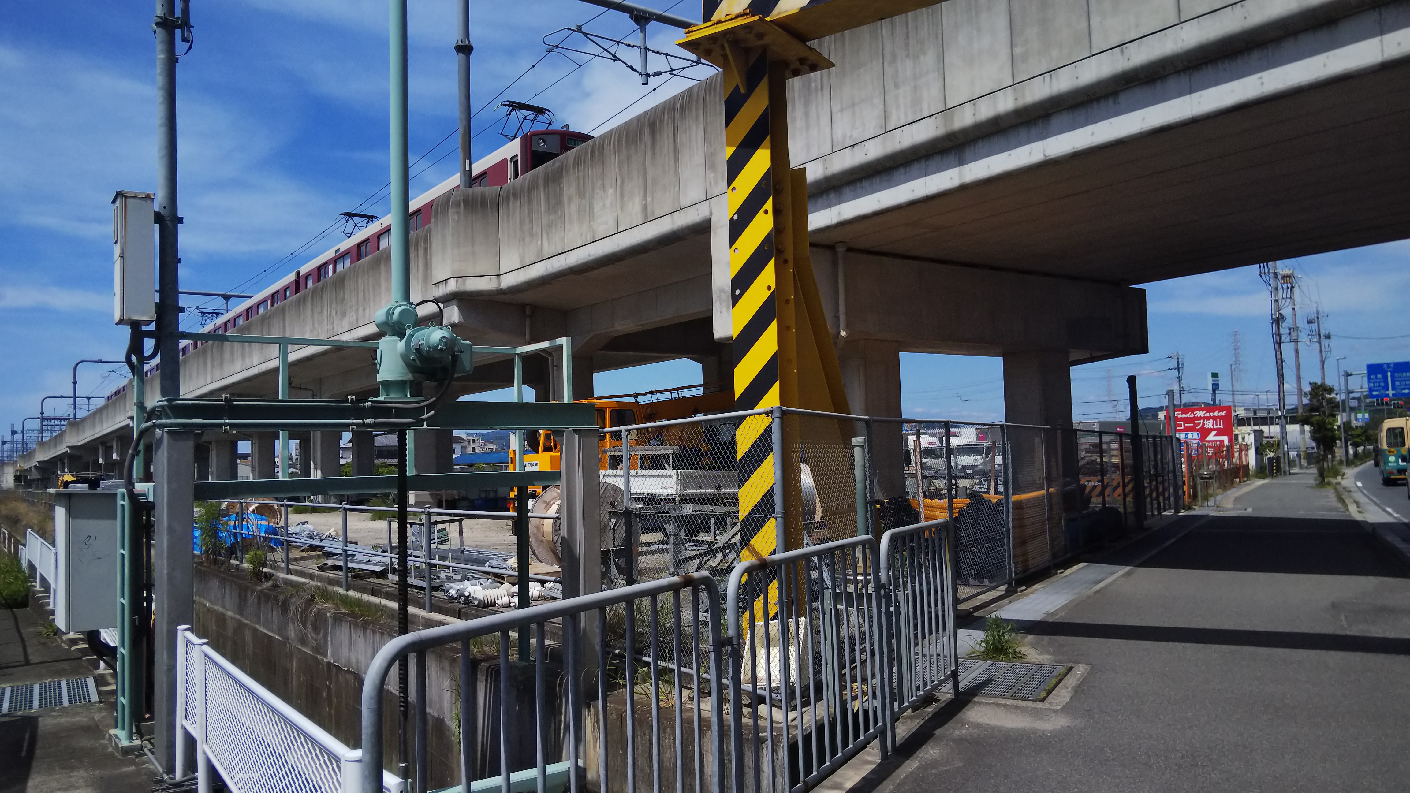 西浦駅の跡地